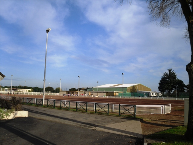 Le stade Pierre de Coubertin de Paray-Vieille-Poste (91)